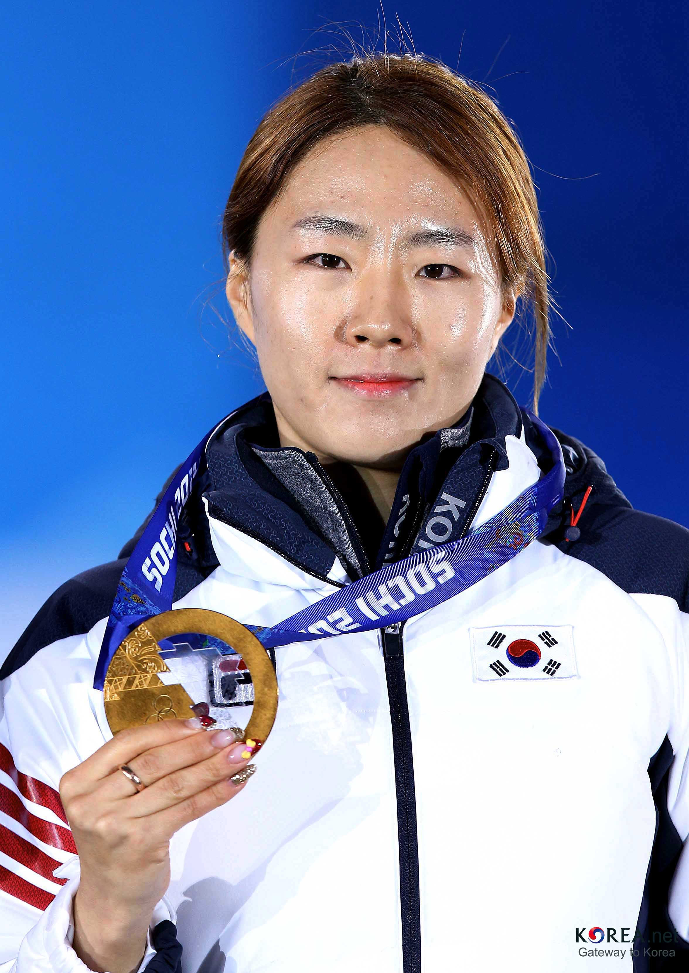 Lee Sang-hwa won Korea’s first gold medal in Sochi February 12, 2014 Adler Arena, Sochi, Russia Photo: The Korean Olympic Committee Related Articles -English- Lee wins gold at 2nd consecutive Olympics, sets new record Speed skater Lee breaks own world record 3 times -Russian- Ли завоевала золото на второй Олимпиаде подряд 이상화 2014 소치 동계올림픽 여자 스피드 스케이팅 500m 올림픽 신기록으로 금메달 획득 2014-02-12 러시아, 소치. 아들레르 아레나 사진: 대한체육회